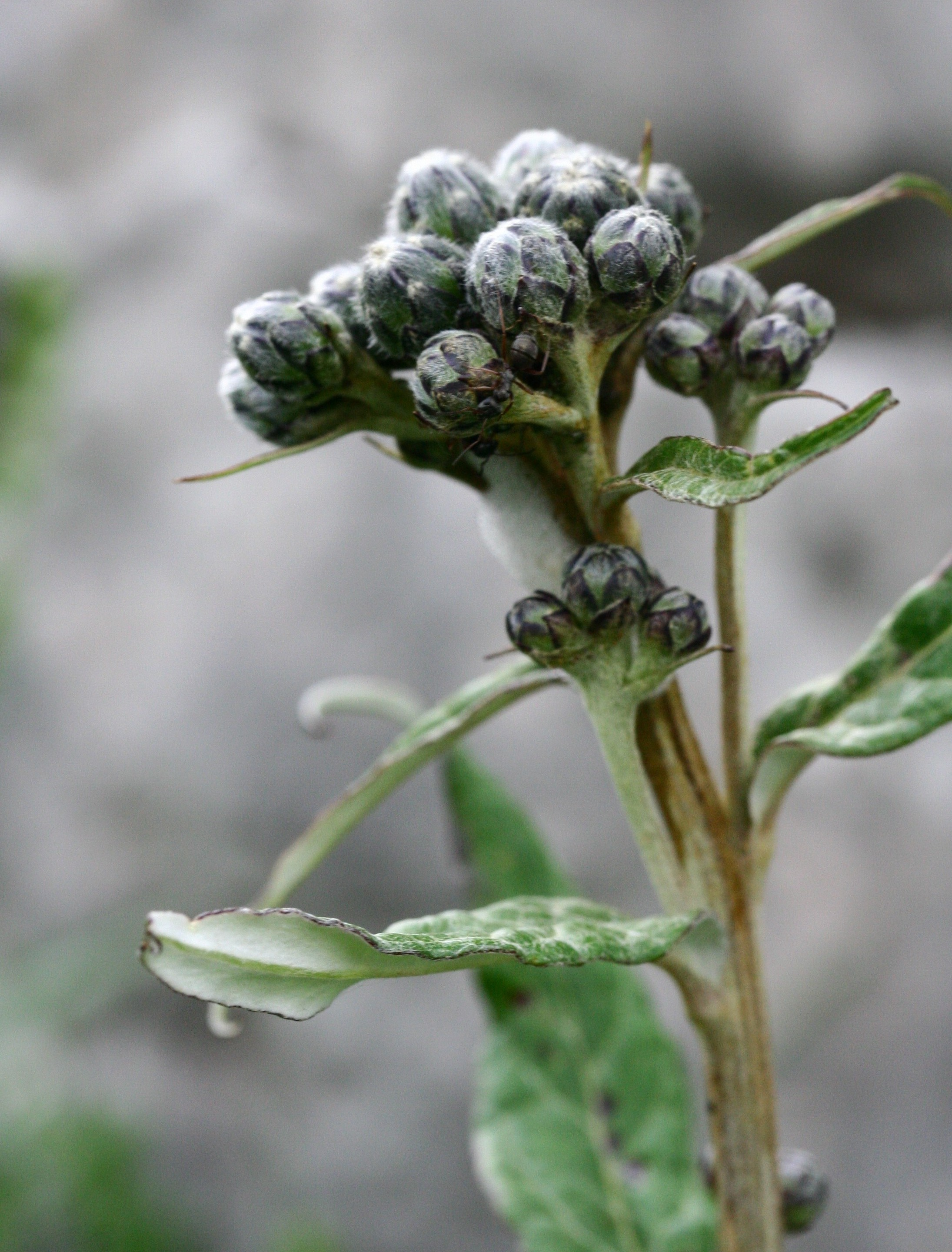 Saussurea discolor - Località: "Giardino Botanico delle Alpi Orientali", Monte Faverghera (BL), 1500 m s.l.m. – 23/06/2007